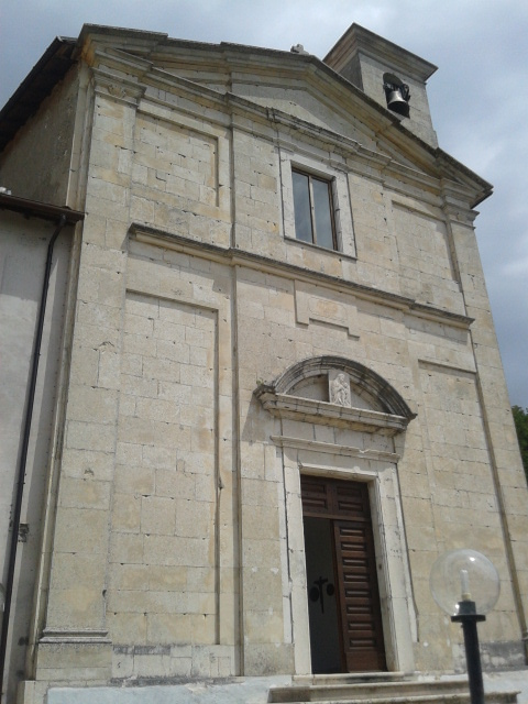 Facciata del santuario della Madonna dei Bisognosi